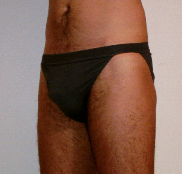 Man wearing a tanga and sporting a manbulge / mooseknuckle